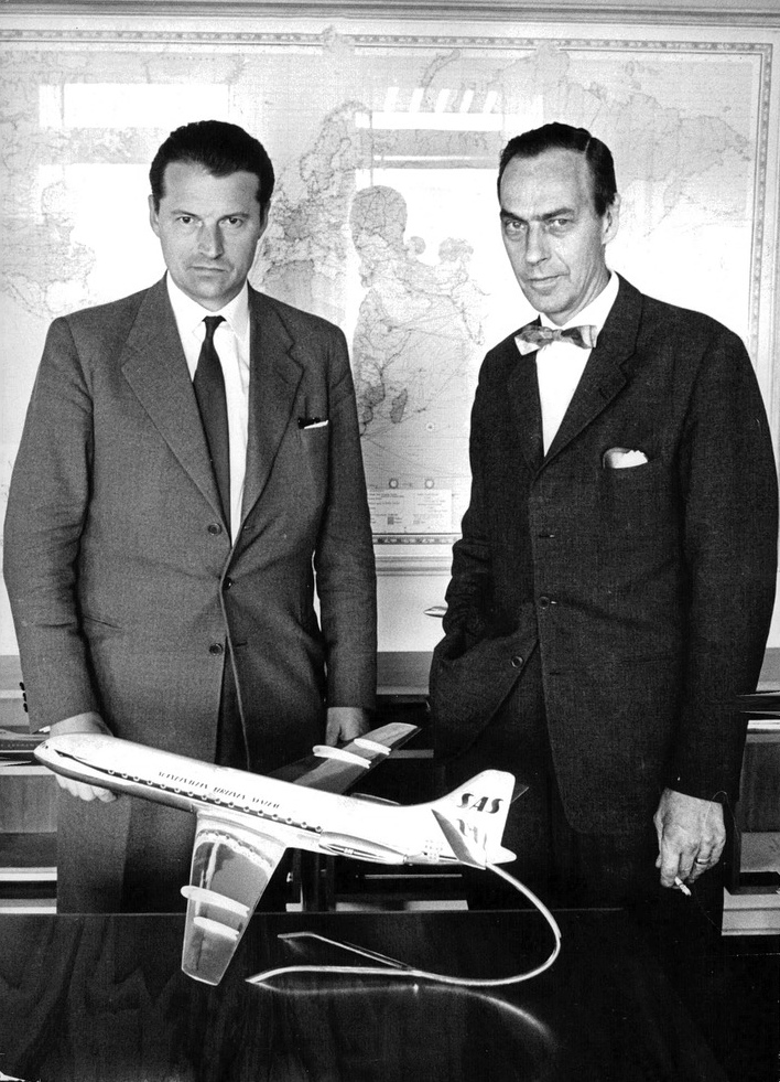 Curt Nicolin och Åke Rusck möttes på onsdagen i en tre timmar lång överläggning.Redan på onsdagseftermiddagen kom Aseachefen Curt Nicolin till SAS kontorsbyggnad vid Bromma flygplats i Stockholm för en första kontakt med nuvarande SAS-chefen direktör Åke Rusck inför maktövertagandet i mitten av juli. Mötet tog tre timmar. Direktör Rusck meddelar vid samtal med Svenska Dagbladet att han överlämnat en del material om företaget till sin tillfällige efterträdare och att mötet varit ett led i strävandena att göra övergången så smidig som möjligt. Måndagen den 17 juli sätter sig direktör Nicolin i chefsstolen på SAS.